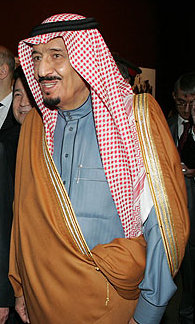 Salman bin Abdulaziz, member of the Saudi royal family